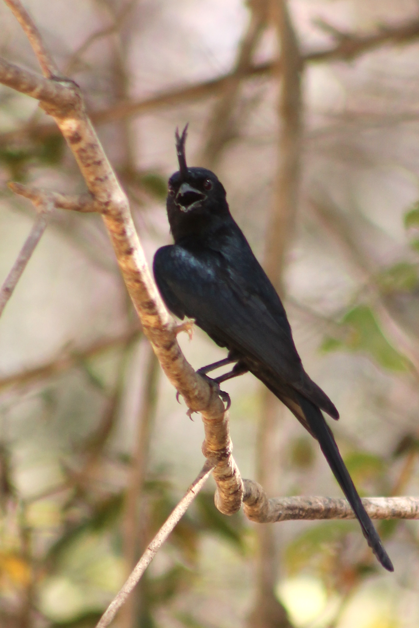 Kuifdrongo in Kirindy